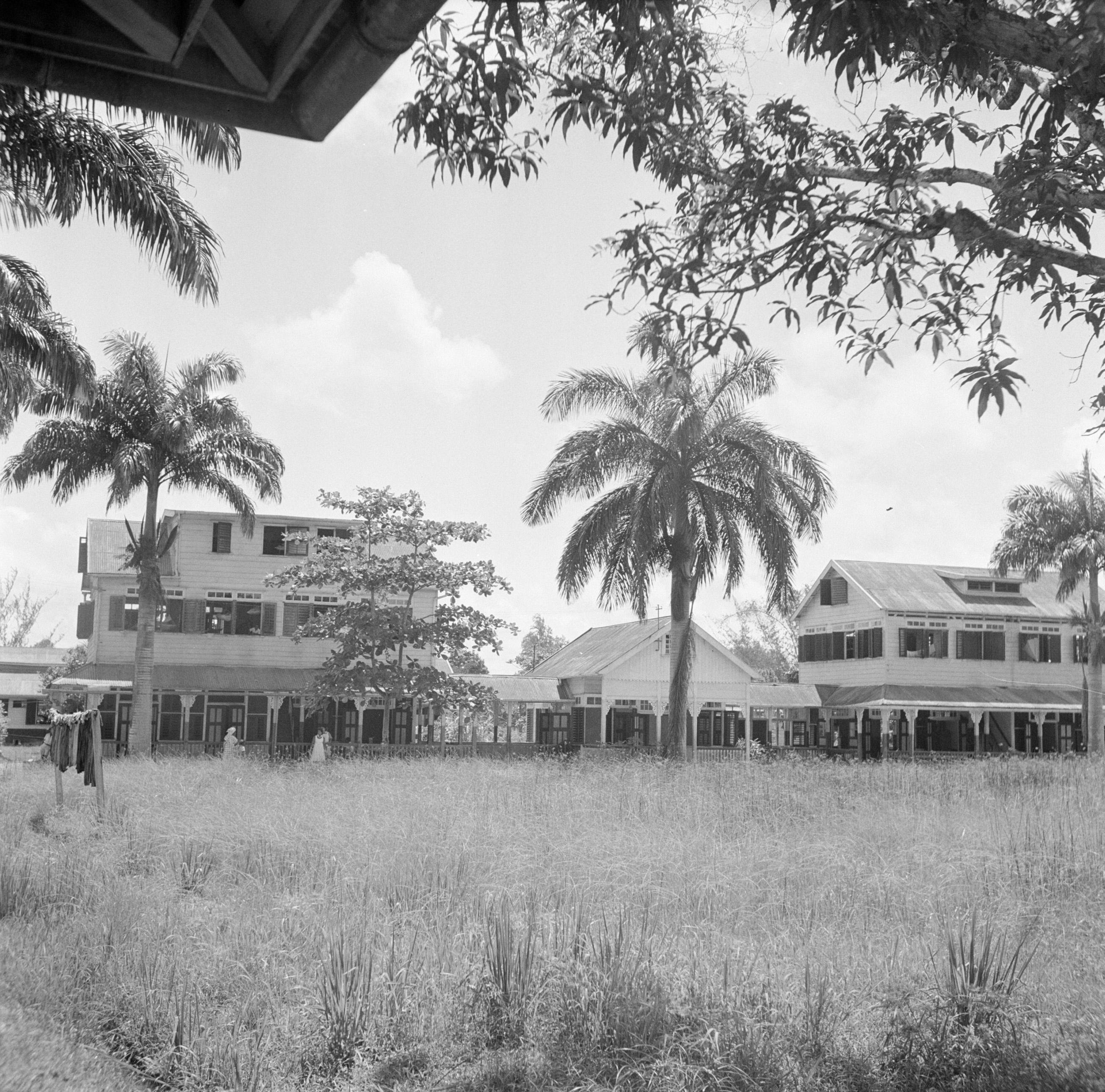 Collectie / Archief : Fotocollectie Van de Poll Reportage / Serie : Reis naar Suriname en de Nederlandse Antillen Beschrijving : De leprozerie Bethesda van de Protestantse Vereniging tot Verpleging van lepralijders in Suriname Datum : 1947 Locatie : Suriname Trefwoorden : gebouwen, lepra, ziekenhuizen Fotograaf : Poll, Willem van de, [onbekend] Auteursrechthebbende : Nationaal Archief Materiaalsoort : Negatief (zwart/wit) Nummer archiefinventaris : bekijk toegang 2.24.14.02 Bestanddeelnummer : 252-6244